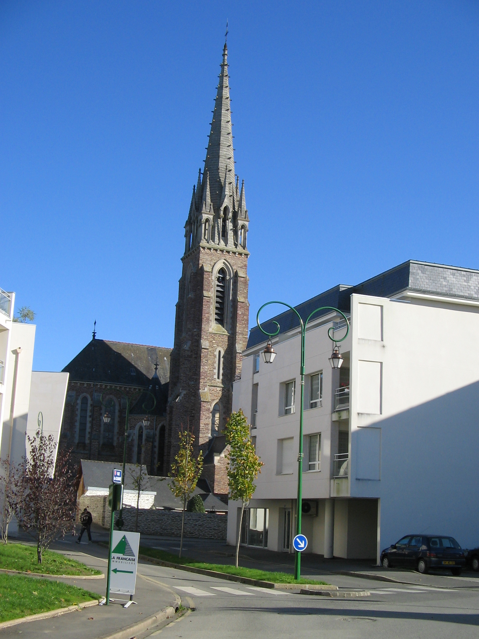 Vue arrière de l'église de Cesson-Sévigné